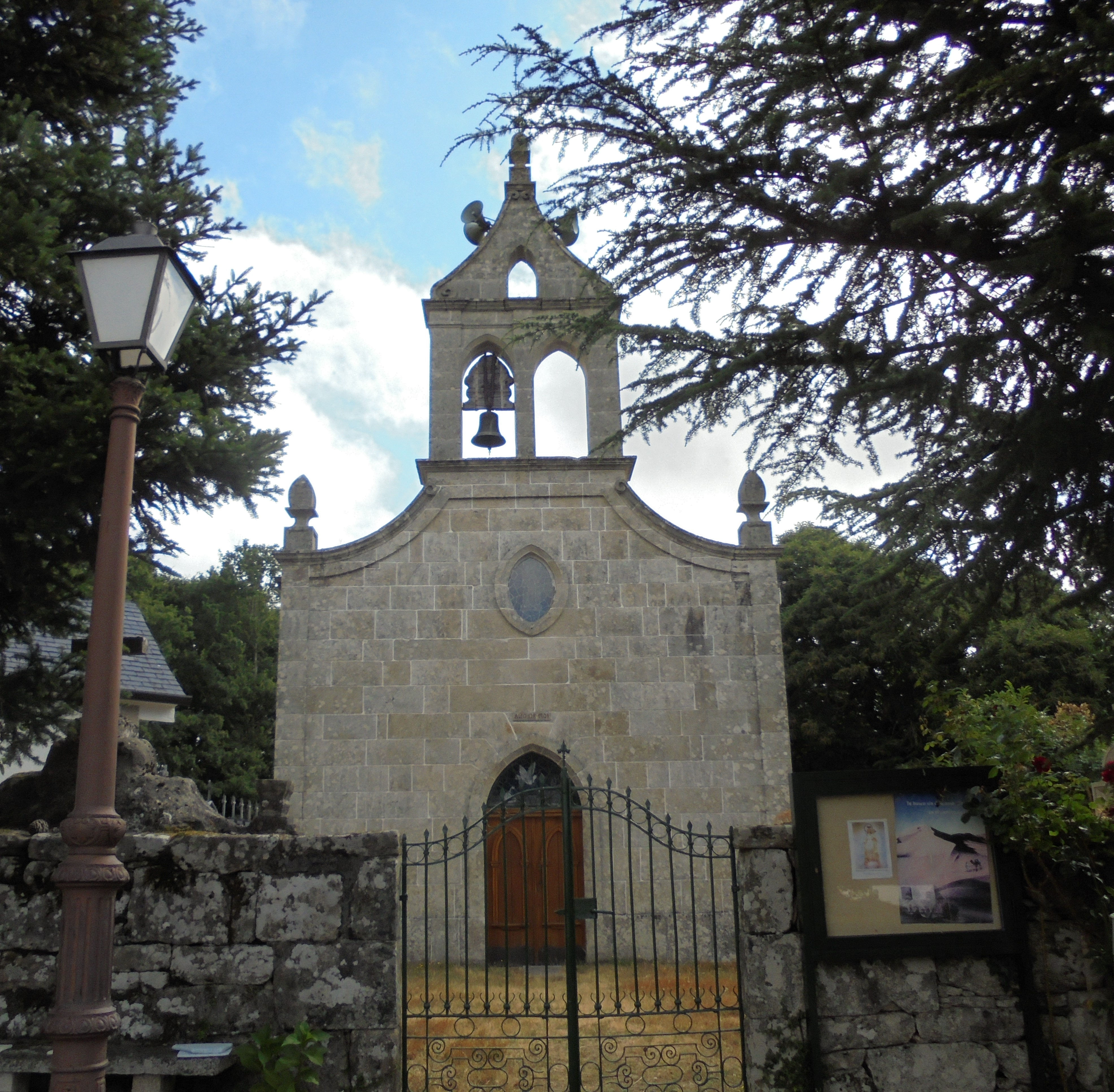 Igrexa parroquial de Adai (Lugo)